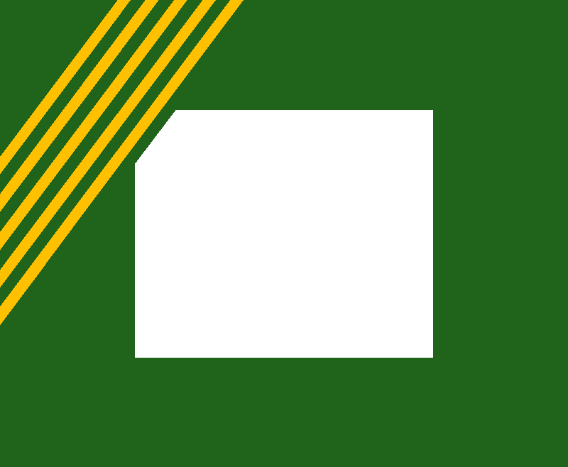 Bandera de Rioja (San Martín, Perú)